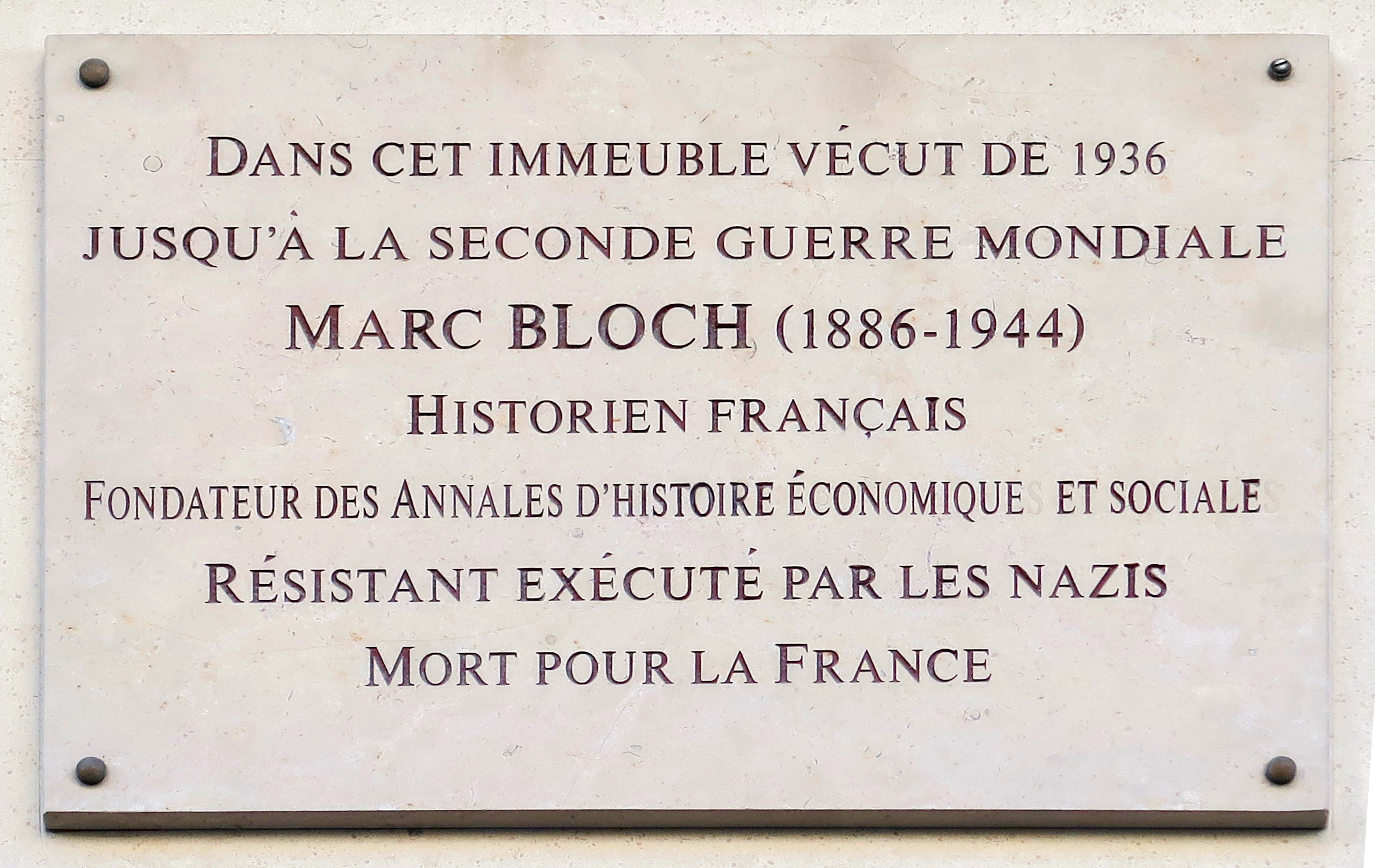 Plaque en hommage à Marc Bloch, 17 rue de Sèvres (Paris, 6e).